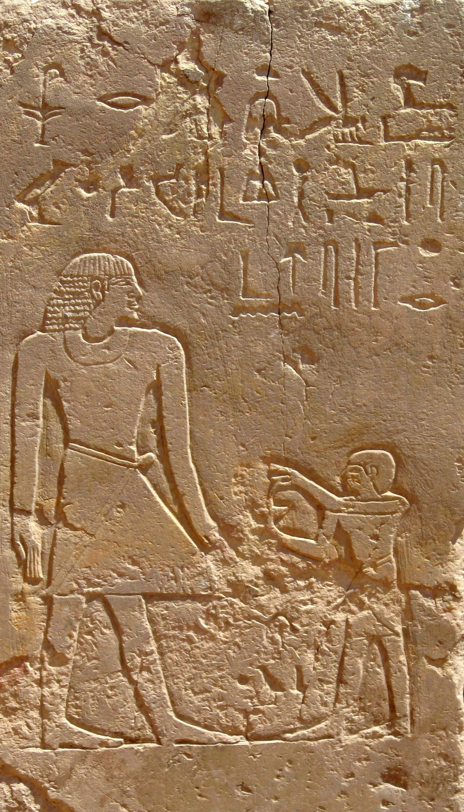 Relief am Aufgang zum Felsengrab des Mechu und des Sabni auf dem Qubbet el-Hawa bei Assuan, Ägypten